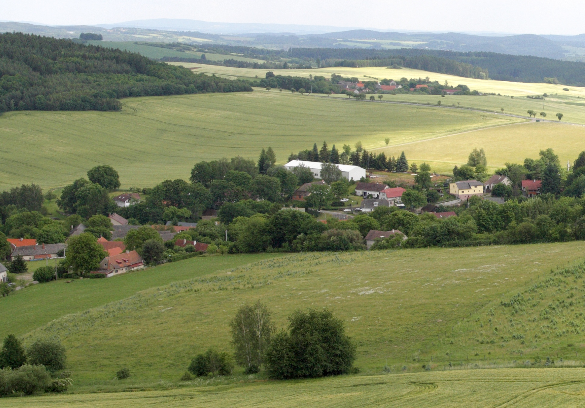 Lbosín - rozhledna Špulka, výhled k Lbosínu.